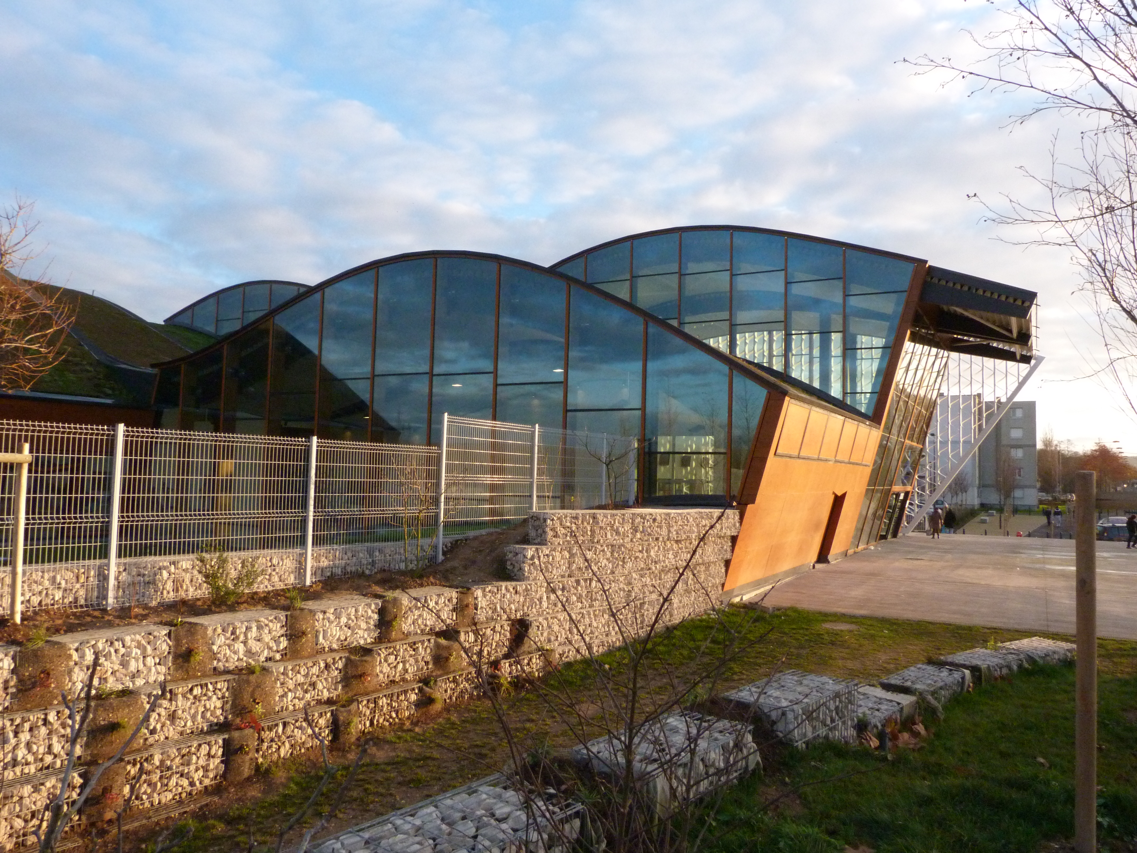 Façade nord.